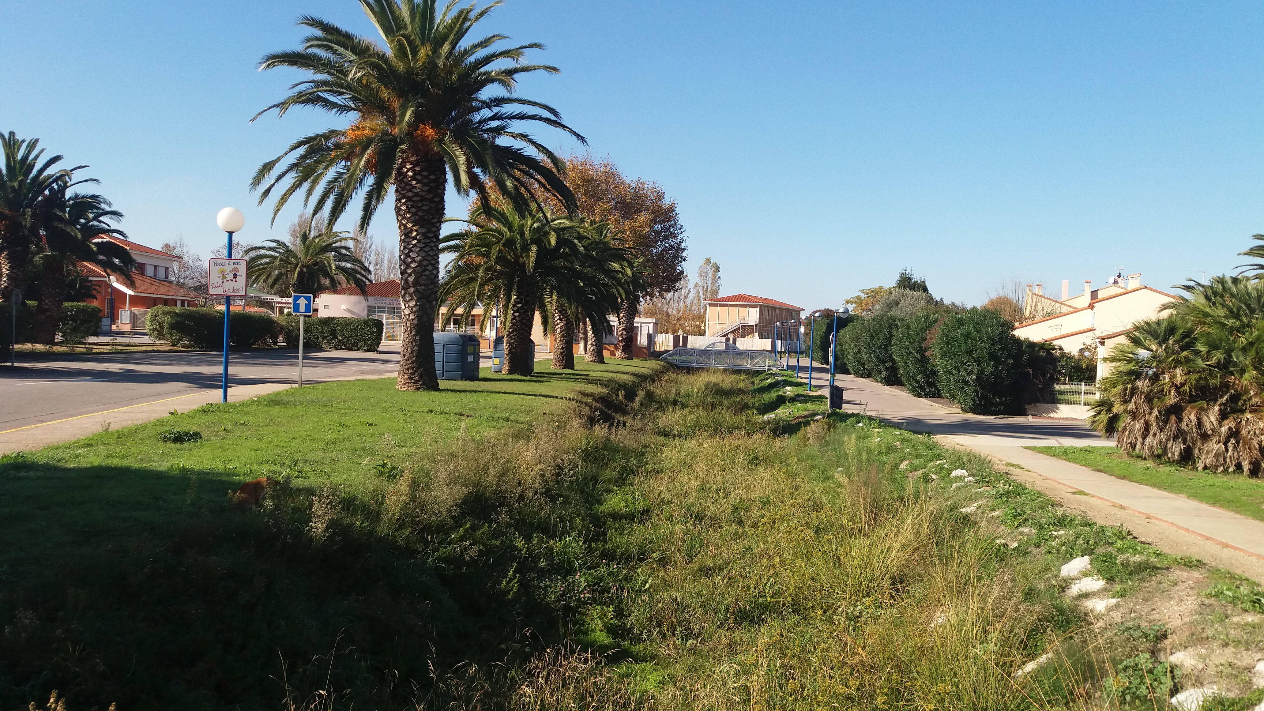 L'Eixau Vell al seu pas pel poble